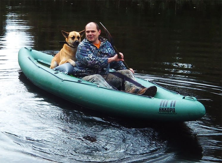 С верным другом.